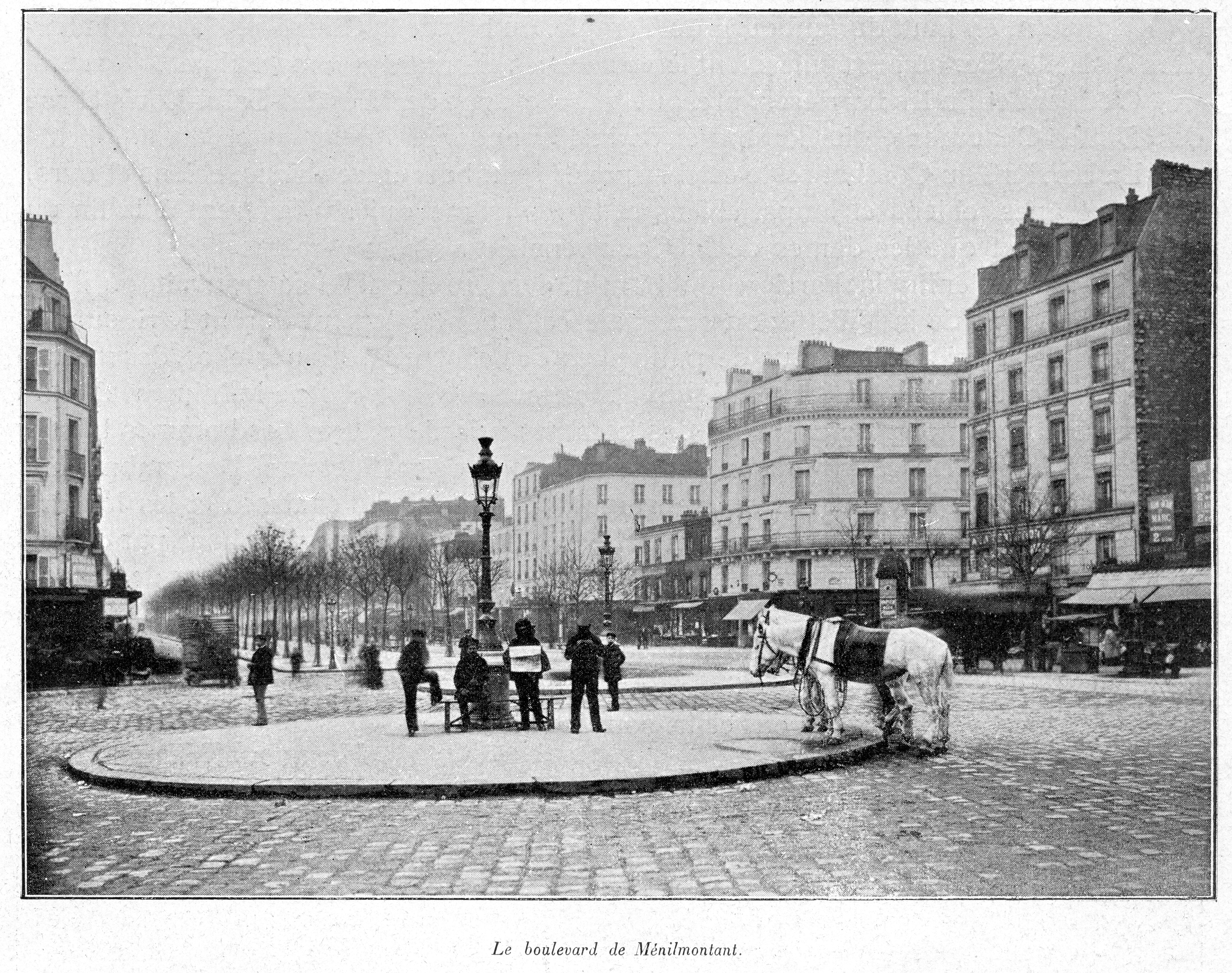 Clément Maurice Paris en plein air, BUC, 1897,Le boulevard de Ménilmontant